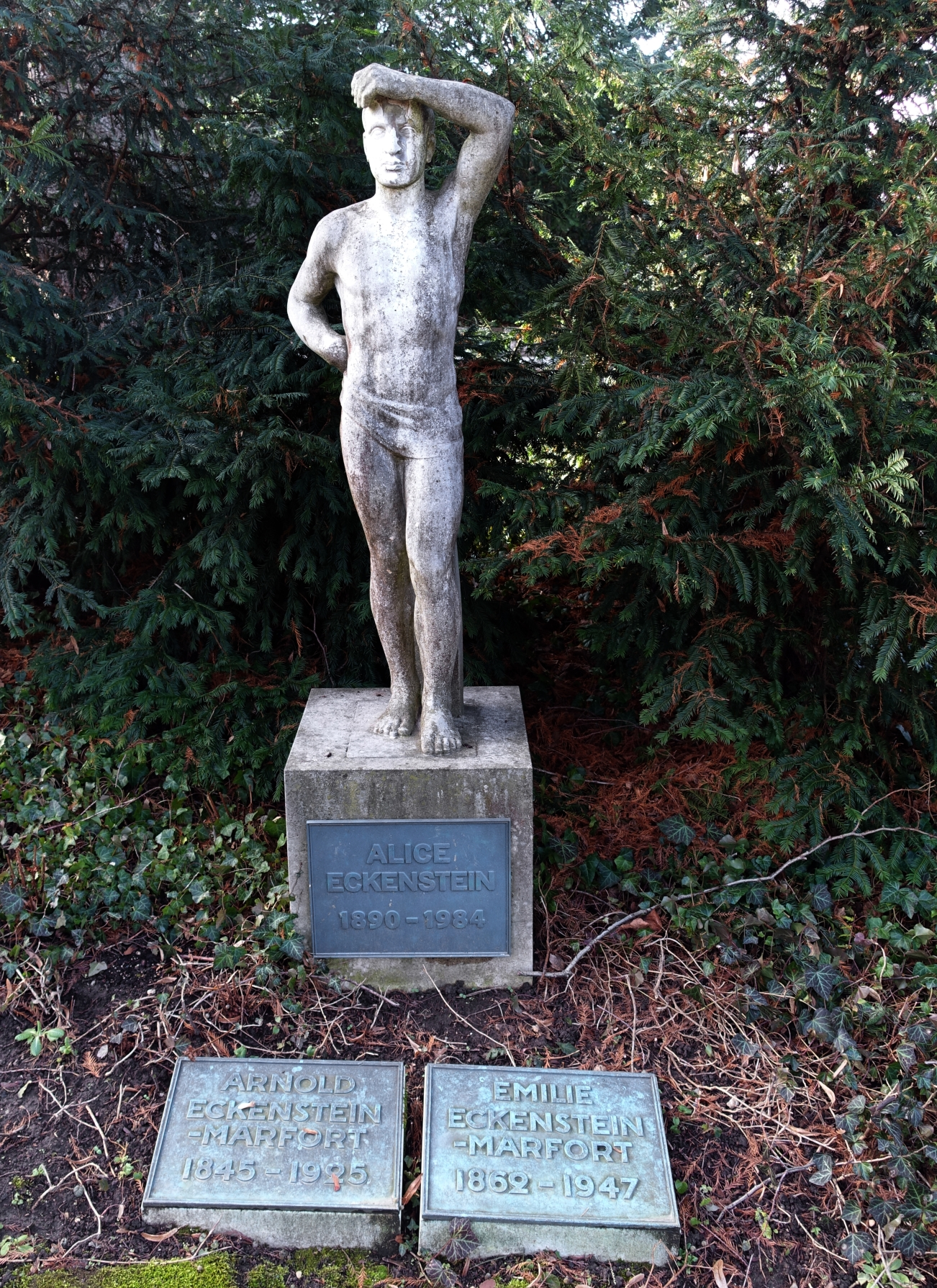 Alice Eckenstein (1890–1984), Schweizerisches Rotes Kreuz (SRK) Helferin im Ersten Weltkrieg. Familiengrab: Eckenstein-Marfort-Geigy-Ziegler auf dem Friedhof Wolfgottesacker, Basel